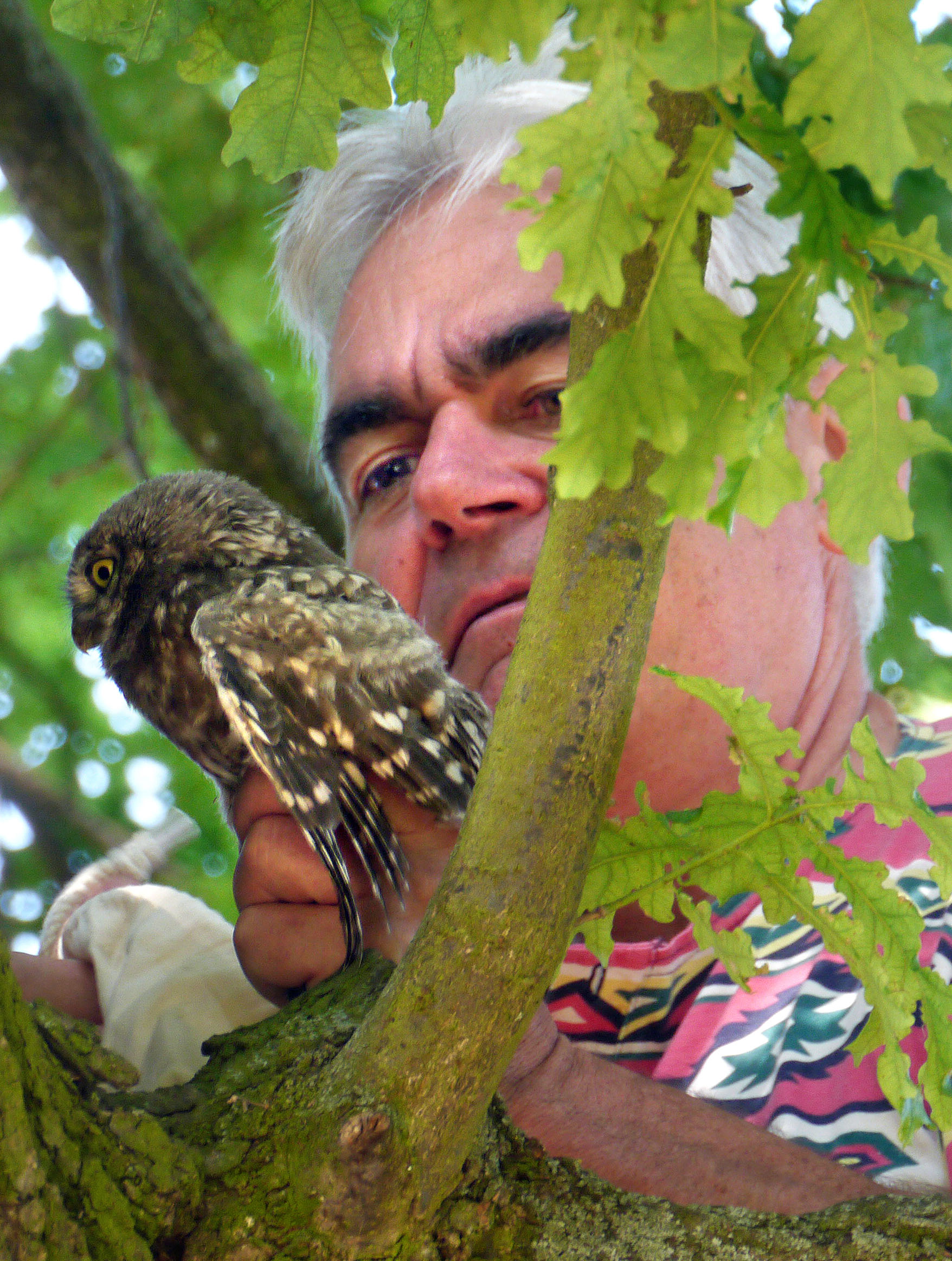 Siegfried Schuch - Naturschützer und langjähriger NABU Landesvorsitzender in Rheinlandpfalz (1988-2018) bei einer Steinkauz-Beringung in der Nähe von Oppemnheim